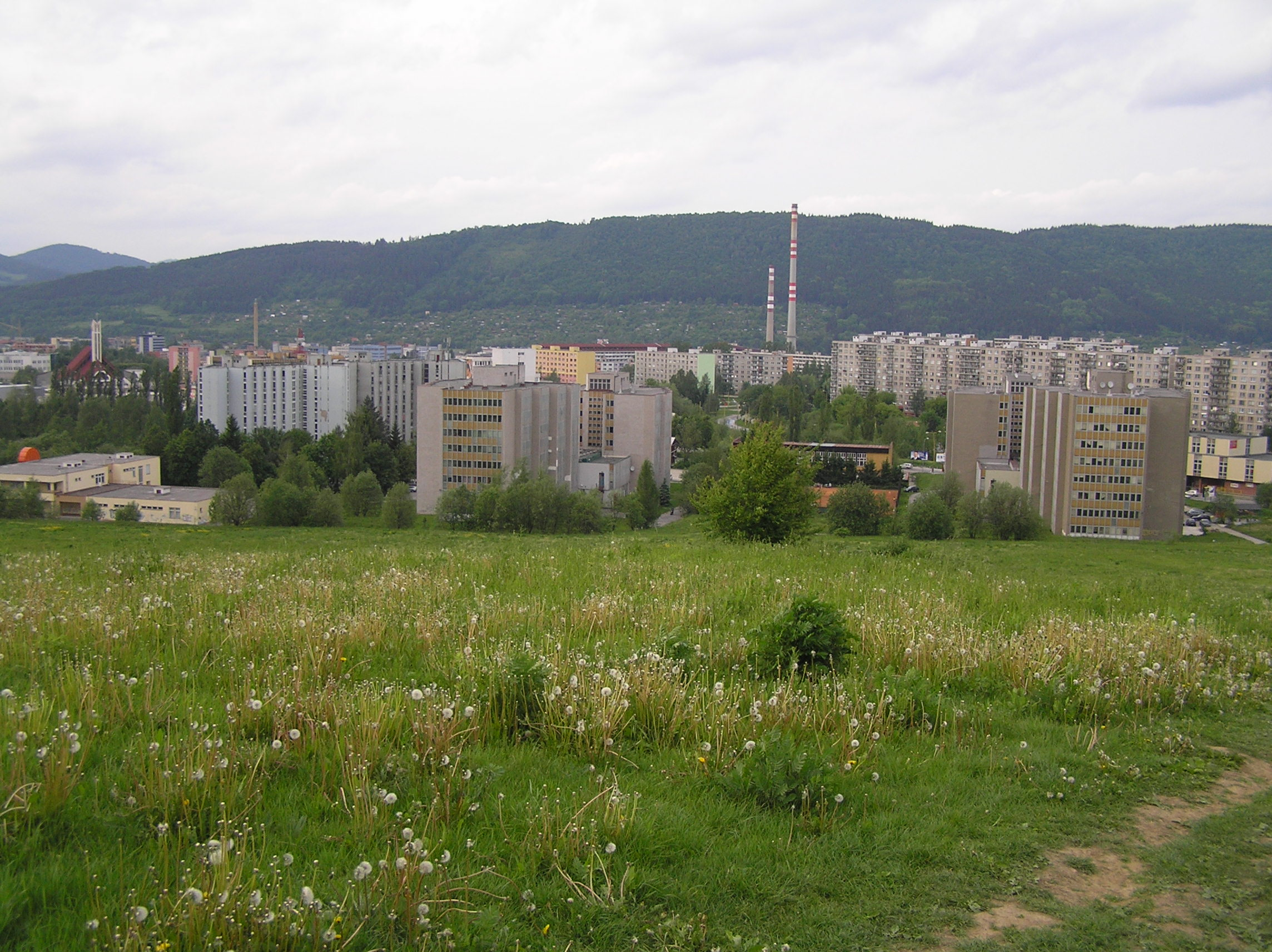 Žilina, pohľad z Veľkého dielu: ubytovacie zariadenie Veľký diel (internáty) zľava: bloky ABCD, EF, GH